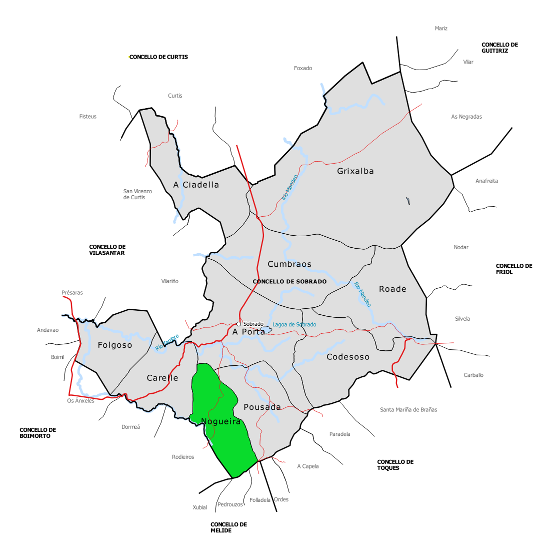 Mapa da parroquia de Nogueira no concello de Sobrado (Galiza).